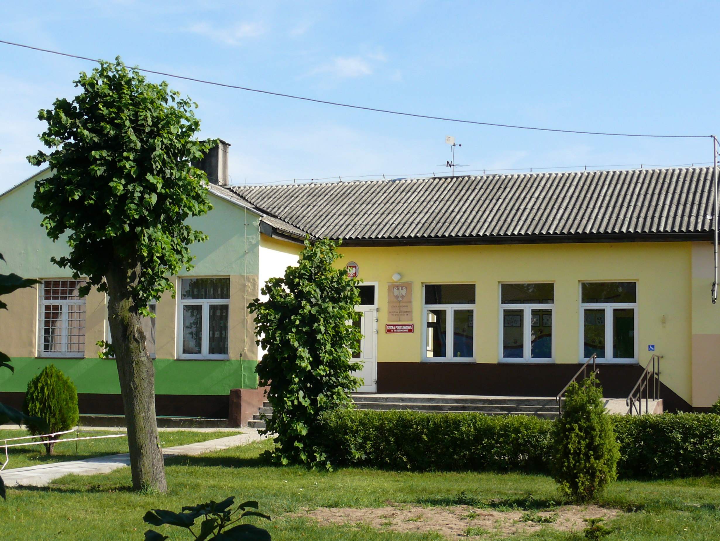 gmach Szkoły Podstawowej w Trzęśniewie